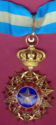 Description Nichan el Anouar Date23 mai 2006 à 17:02SourceOwn workAuthorJb1902 auteur de l'article Nichan el Anouar